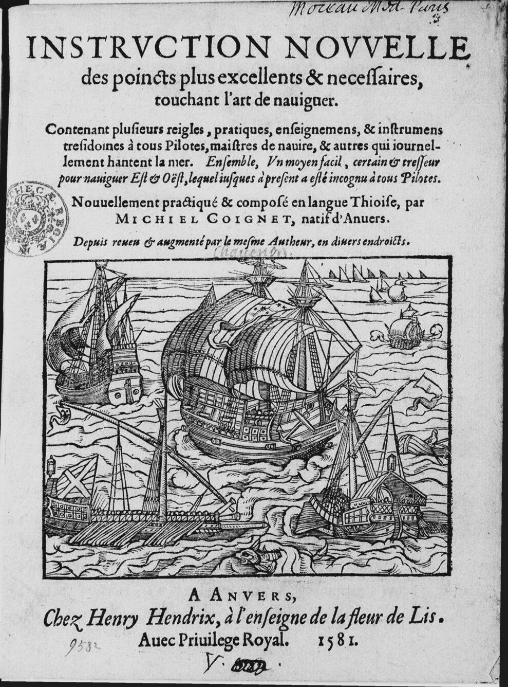 Instruction nouvelle des poincts plus excellents et nécessaires, touchant l'art de naviguer... nouvellement practiqué et composé en langue thioise, par Michiel Coignet,... Depuis reveu et augmenté par le mesme autheur..